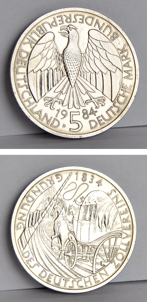 Gründung des Deutschen Zollvereins